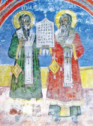 Железнец, црква Св. Богородица, св. Кирил и св. Методија, олтарен простор, јужен ѕид